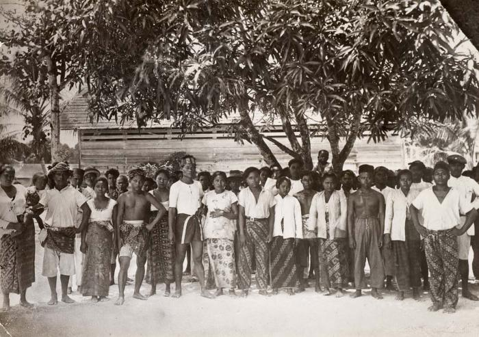 Foto. Origineel glasnegatief behoort tot de collectie van Stichting Surinaams Museum, Paramaribo; inv. nr. SSM f 15-135.. Javaanse arbeiders aangekomen bij de koelieverblijven